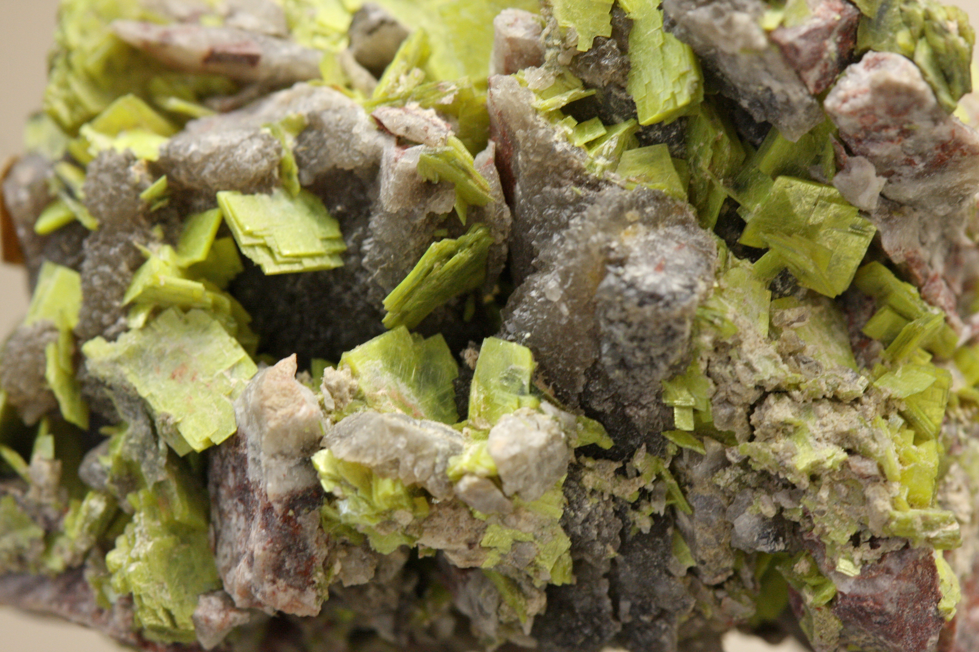 Autunit xx auf Baryt, Fundort: Bergen, Vogtland. Mineralogisches Museum Bonn